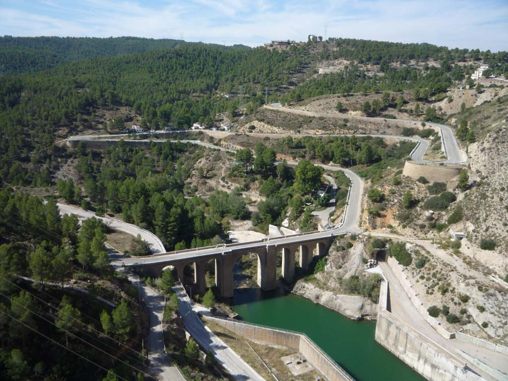 Puente sobre el rio Cabriel de la antigua nacional N-III. Tomada desde la presa de Contreras.